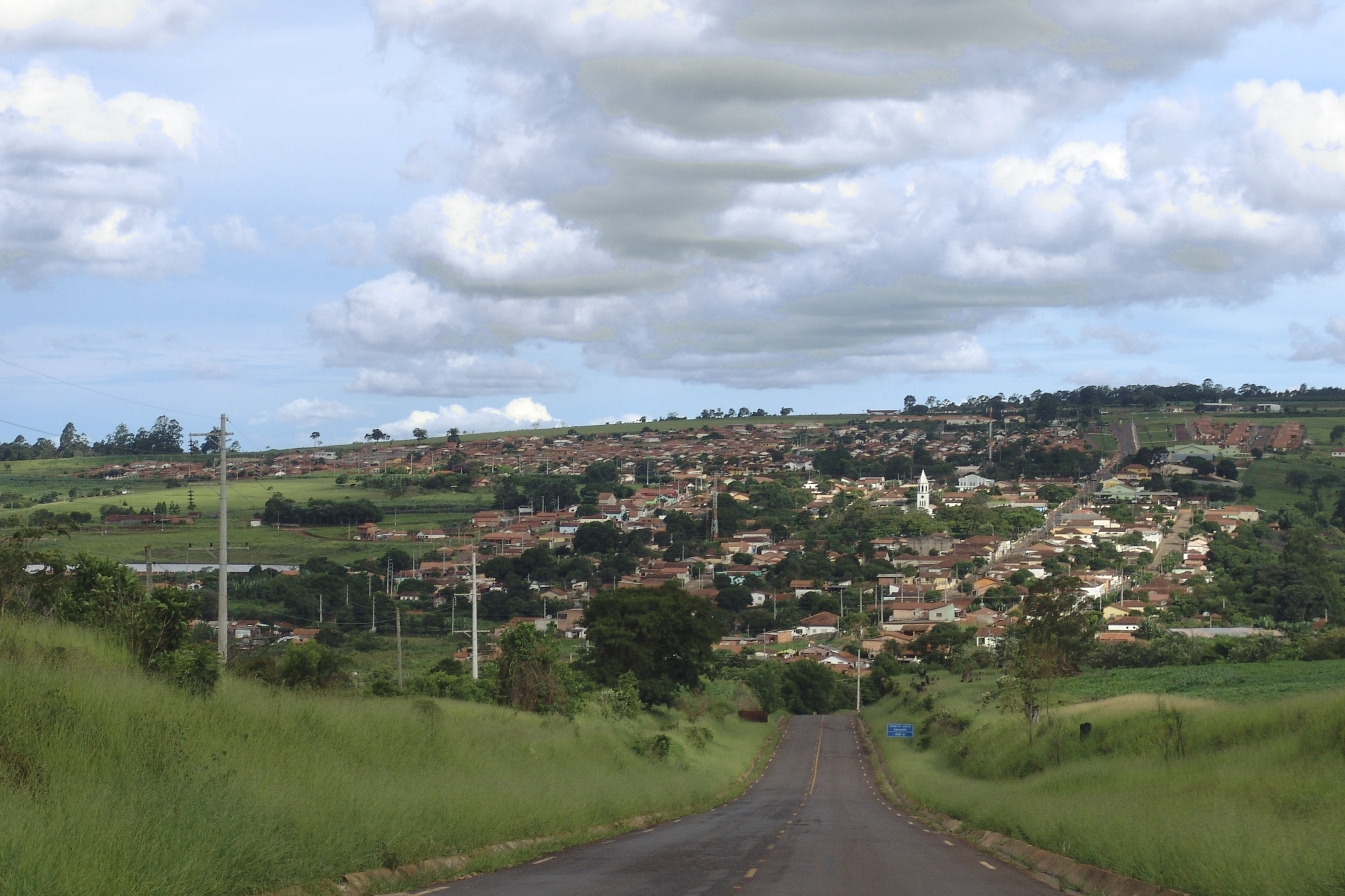 Vista do município de Sarutaiá, Brasil